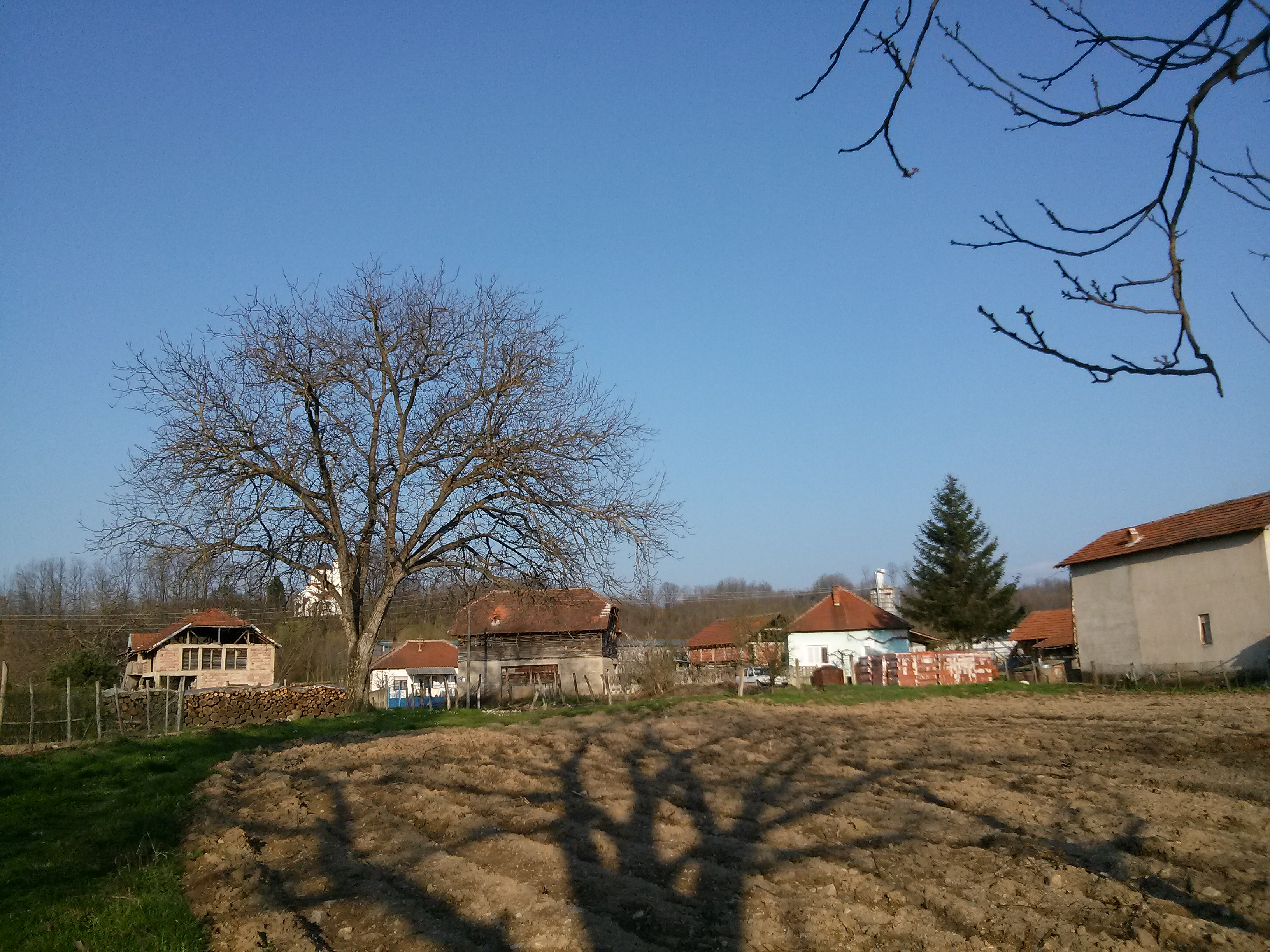 Srpski (latinica): Nakrivanjski Čifluk, zaselak sela Nakrivanj